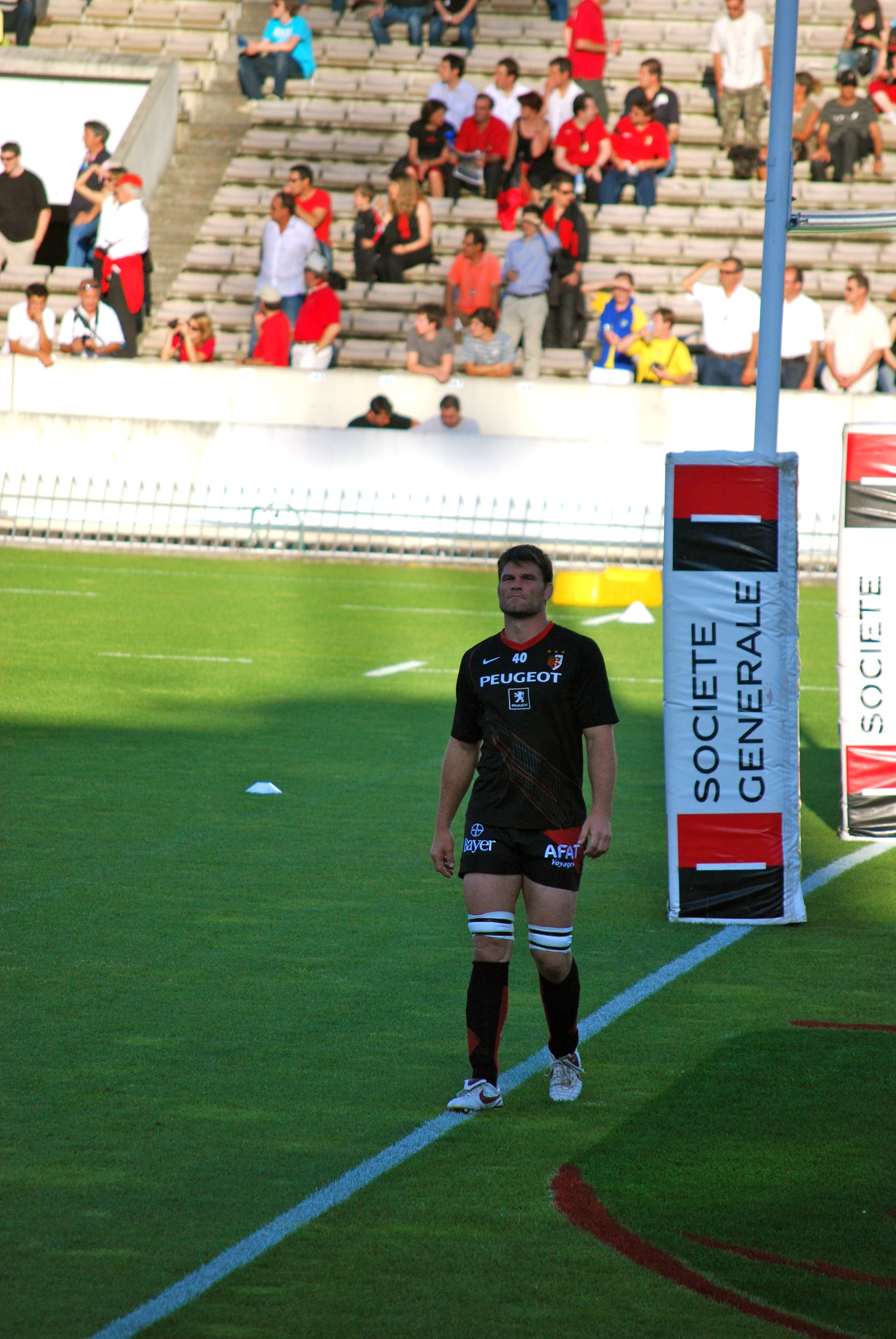 Fabien Pelous avant la demi-finale Toulouse/Clermont du top 14 2008-2009